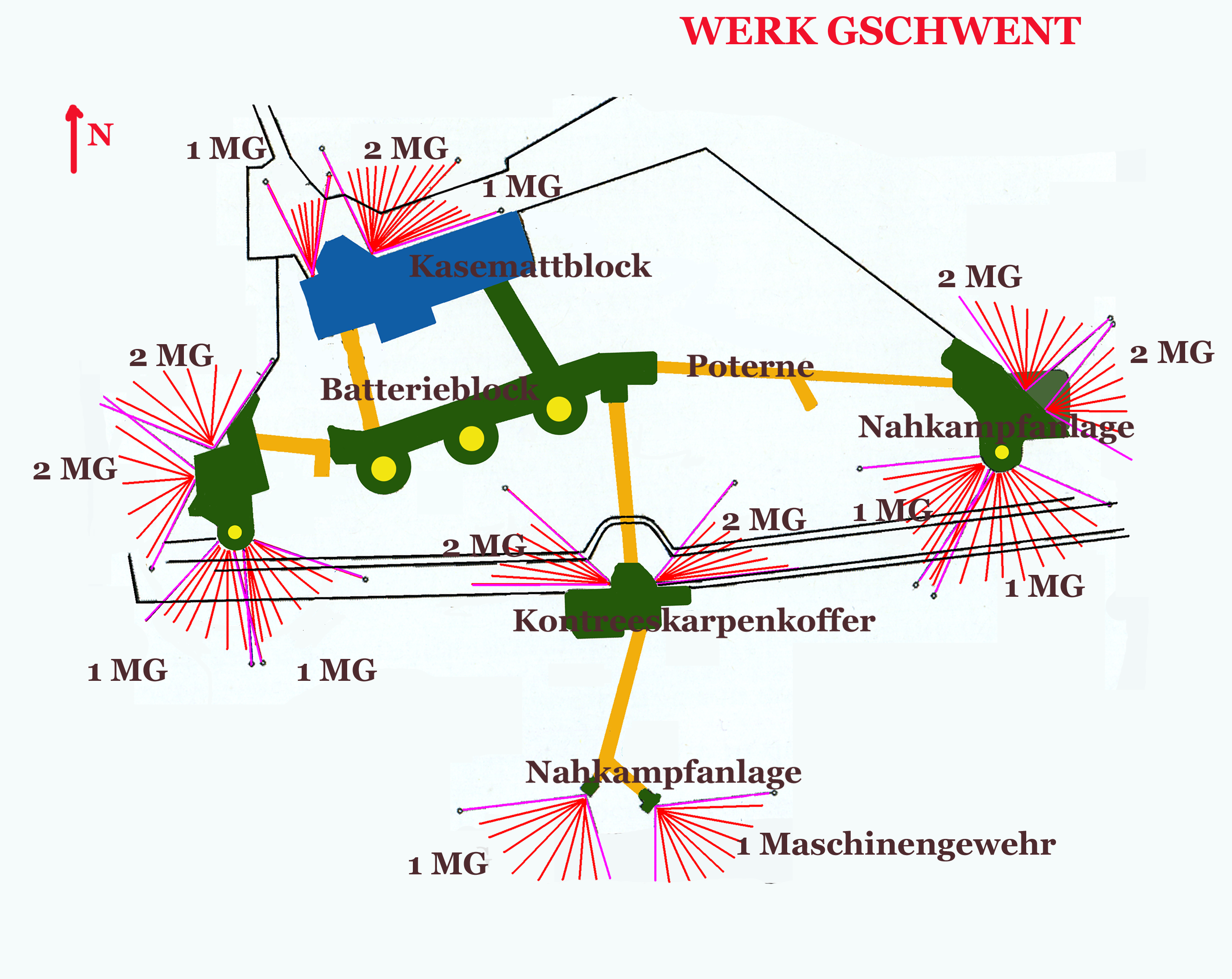 Plan des k.u.k. Panzerwerk Gschwent